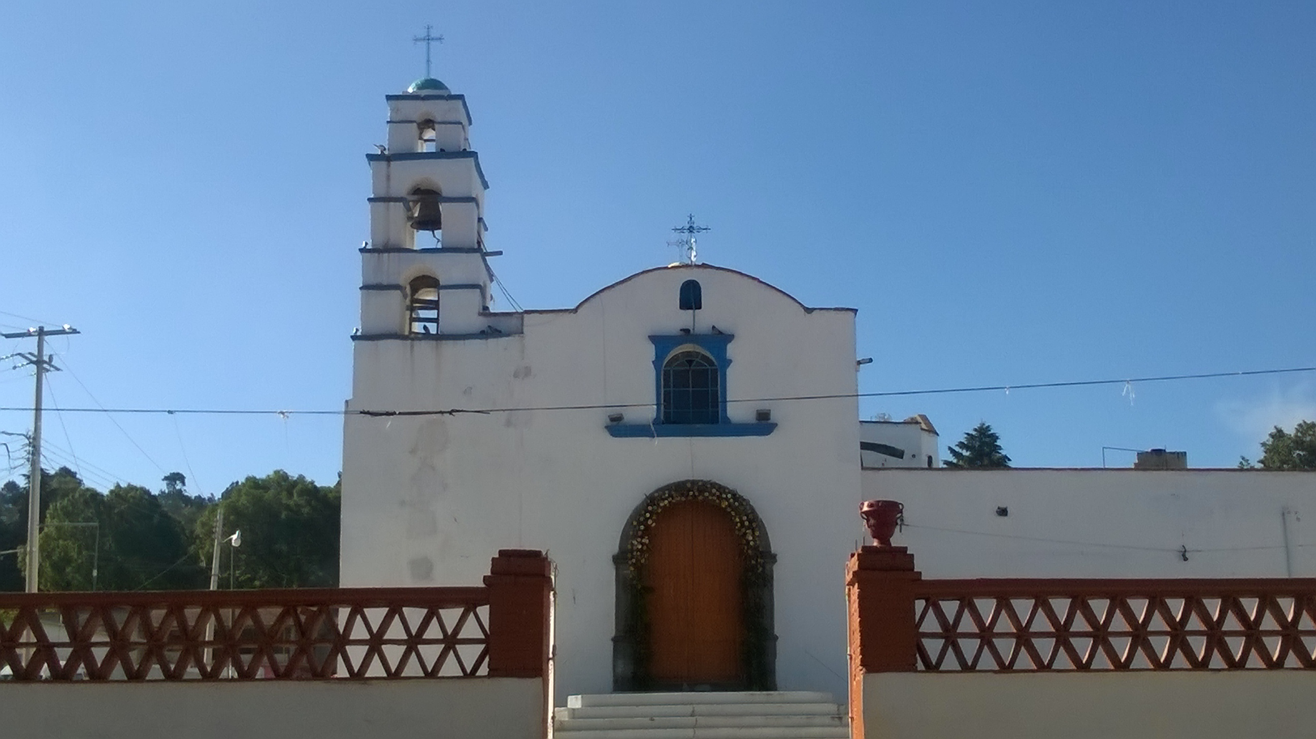 Parroquia de Santa María Tocatlán, Tlaxcala